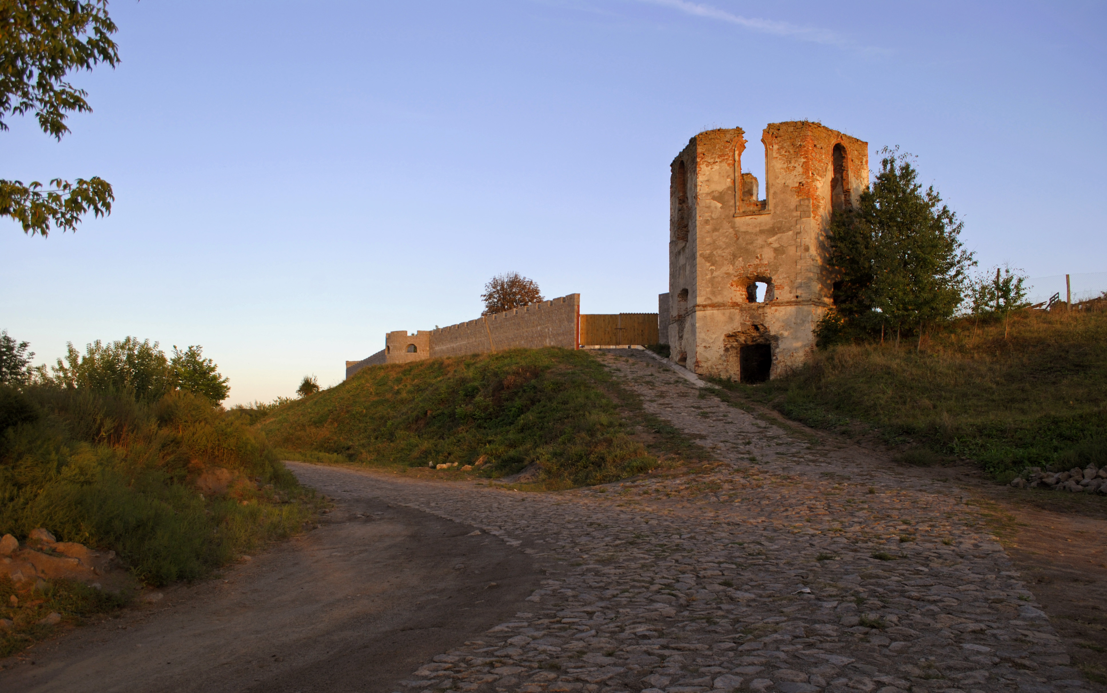 Черленківський замок (башта), Селище, вул. Кірова